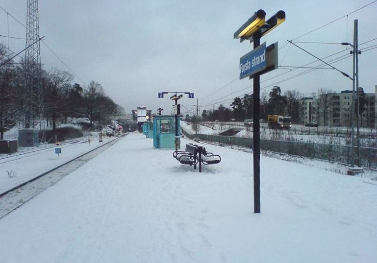 Farsta strand station